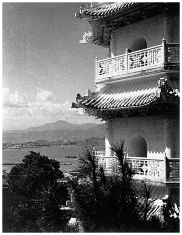 1940年香港虎豹別墅